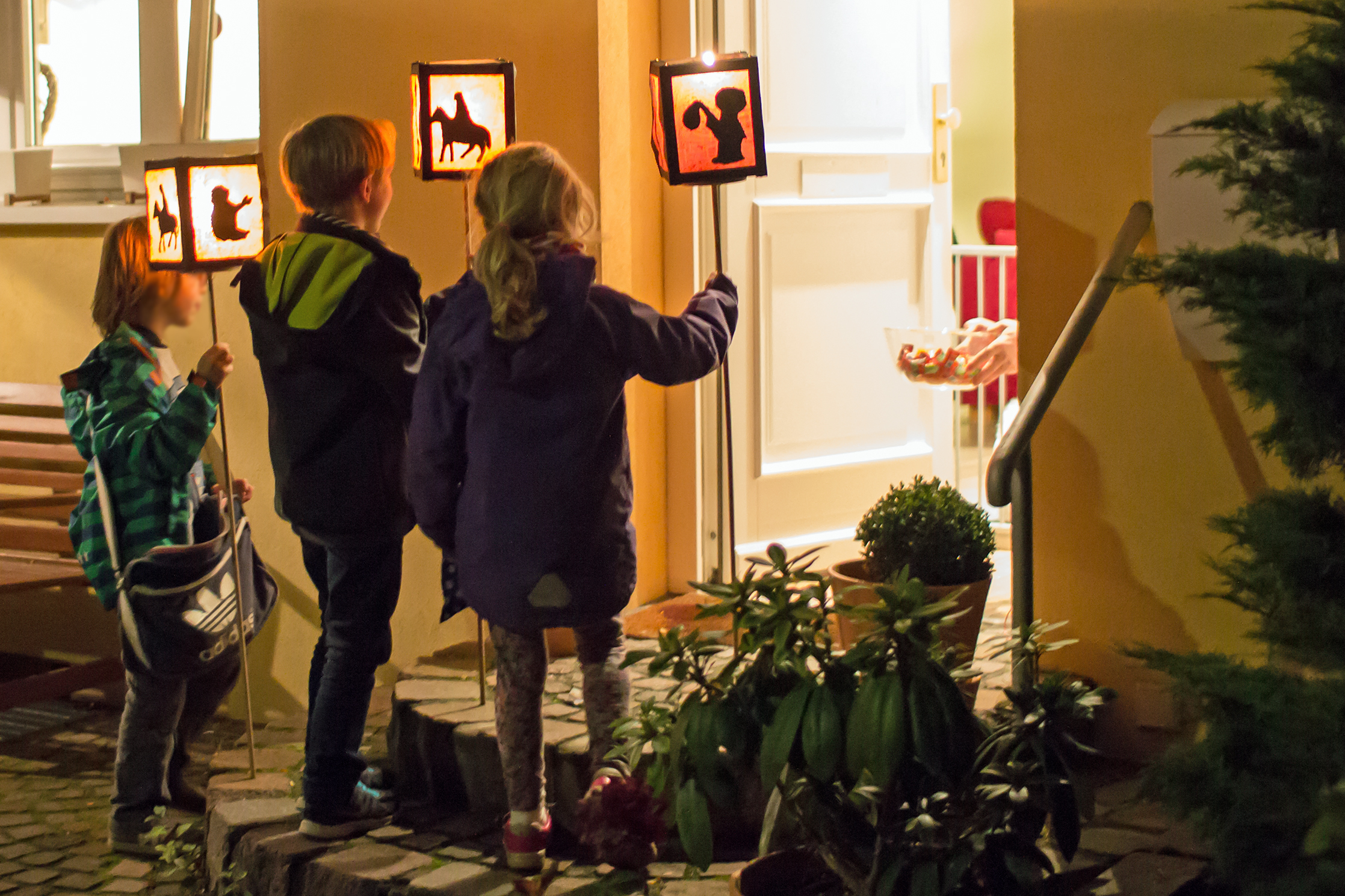 Kinder beim Martinssingen in Köln-Neuehrenfeld